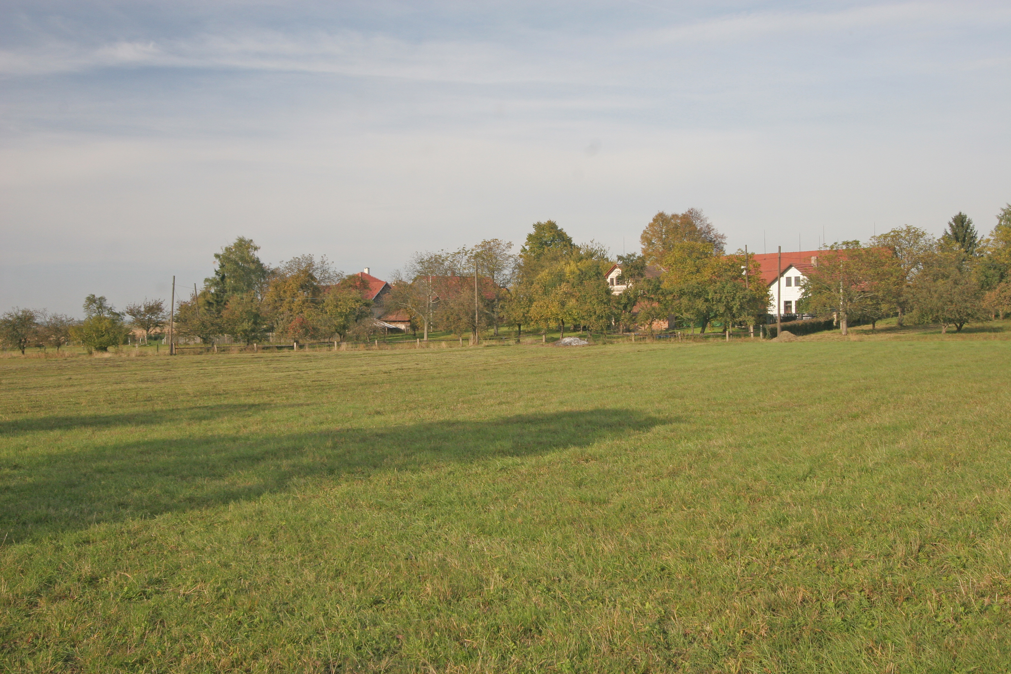 Borovice u Libníkovic